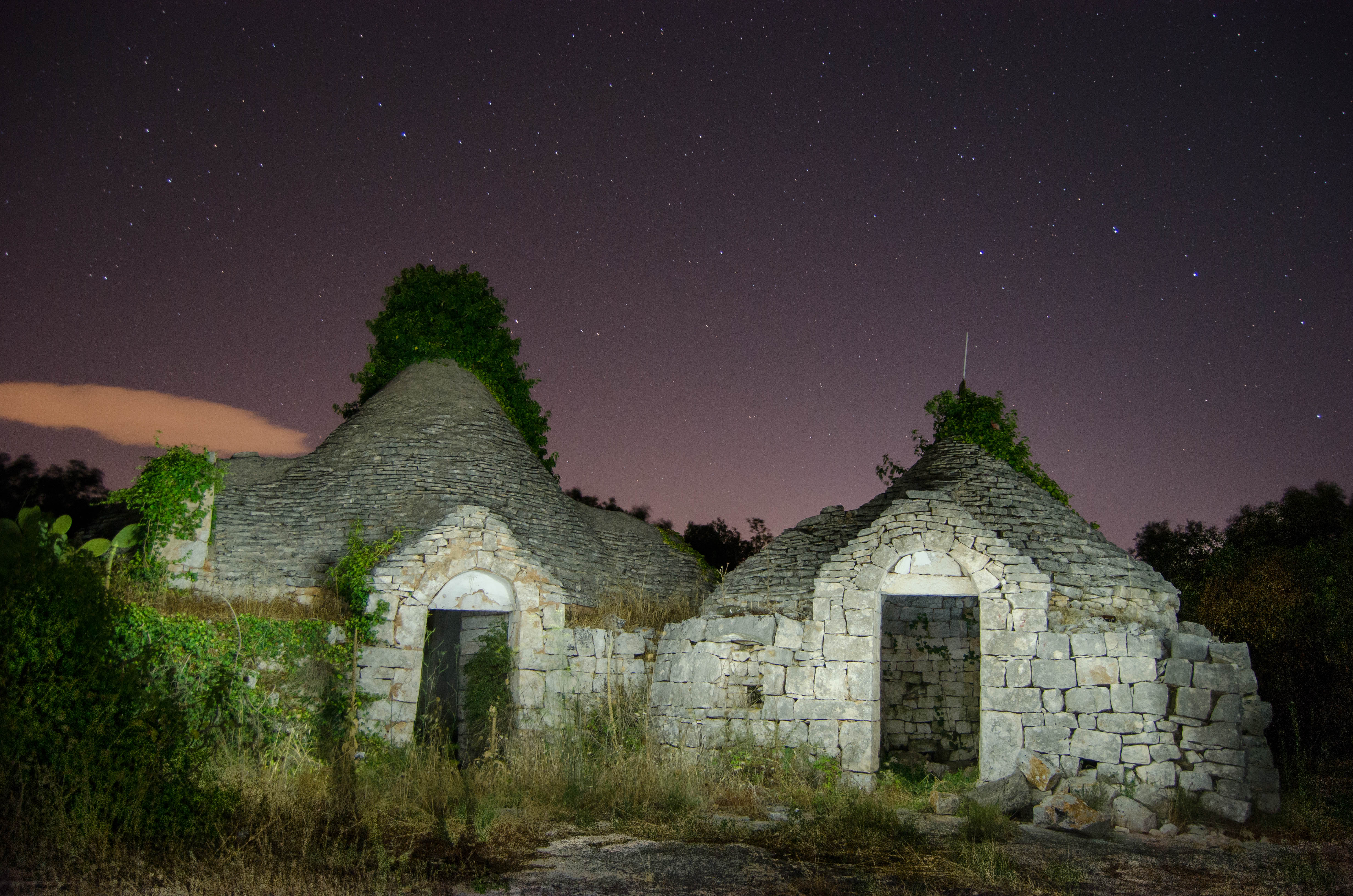 Serie di trulli